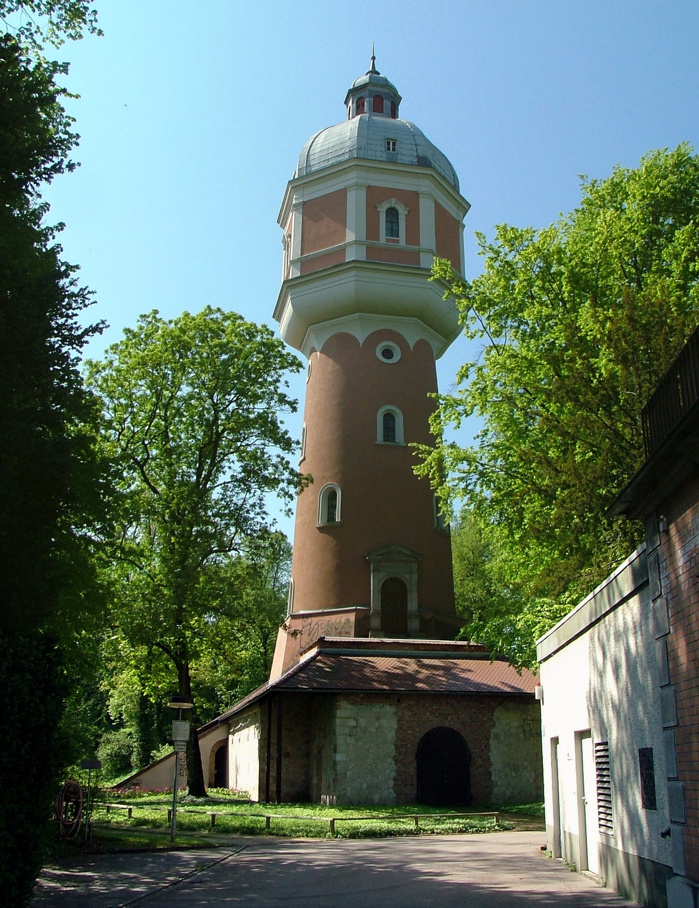 Wasserturm